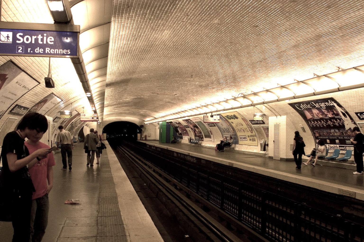 Paris Metro Saint-Placide station